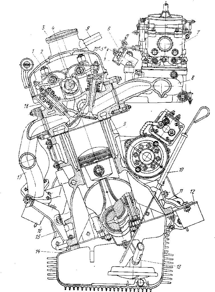 Поперечный разрез двигателя модели 412: 1 — крышка клапанного механизма; 2 — ось коромысел; 3 — крышка маслоналивной горловины; 4 — распределительный вал; 5 - патрубок системы вентиляции картера; 6 — кран отбора охлаждающей жидкости в теплообменник отопителя кузова; 7 — карбюратор; 8-впускная труба; 9 — блок цилиндров; 10 — направляющая трубка указателя уровня масла; 11 и 15 — кронштейн передней опоры силового агрегата; 12 и 16 — подушка передней опоры силового агрегата; 13 — трубка, соединяющая маслоприемник с насосом; 14 — масляный картер (поддон); 17 — выпускной трубопровод; 18 — головка блока цилиндров